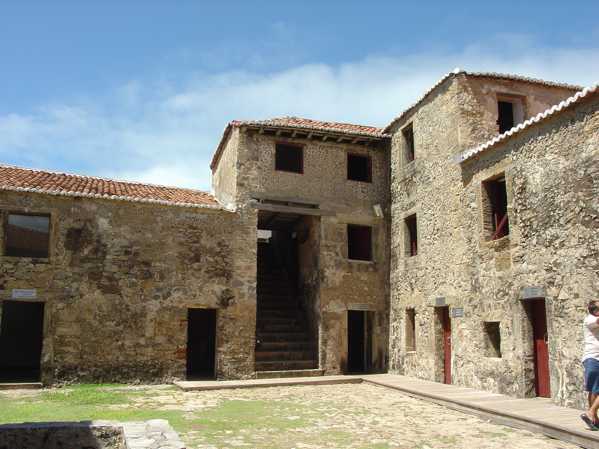 Foto interna da fortaleza dos Reis Magos tirada em visita à cidade do Natal em 2006